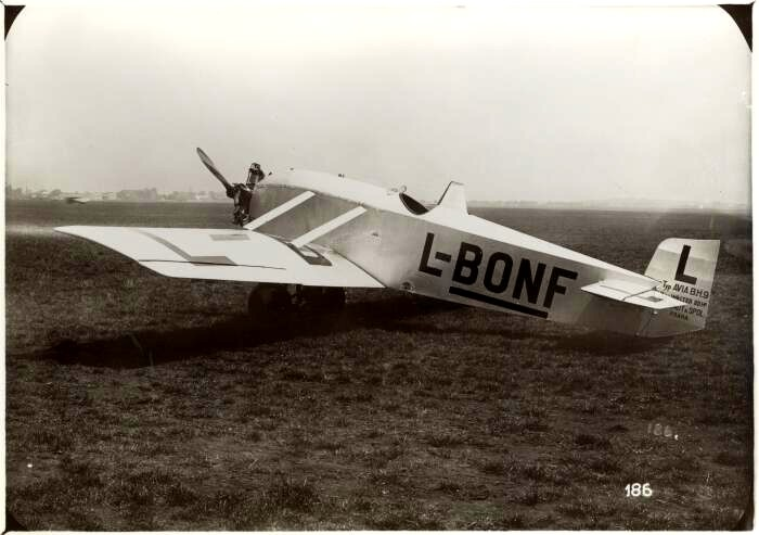 Avia BH-9